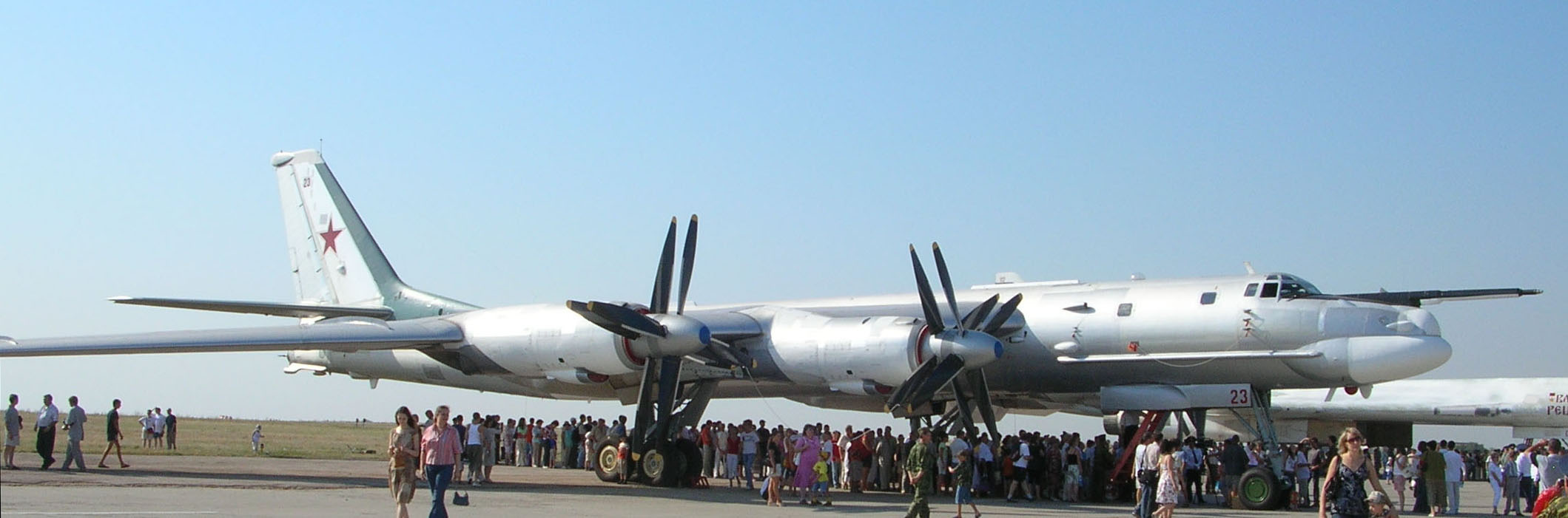 Стратегический ракетоносец Ту-95МС (б.н. 23) на авиабазе Энгельс.